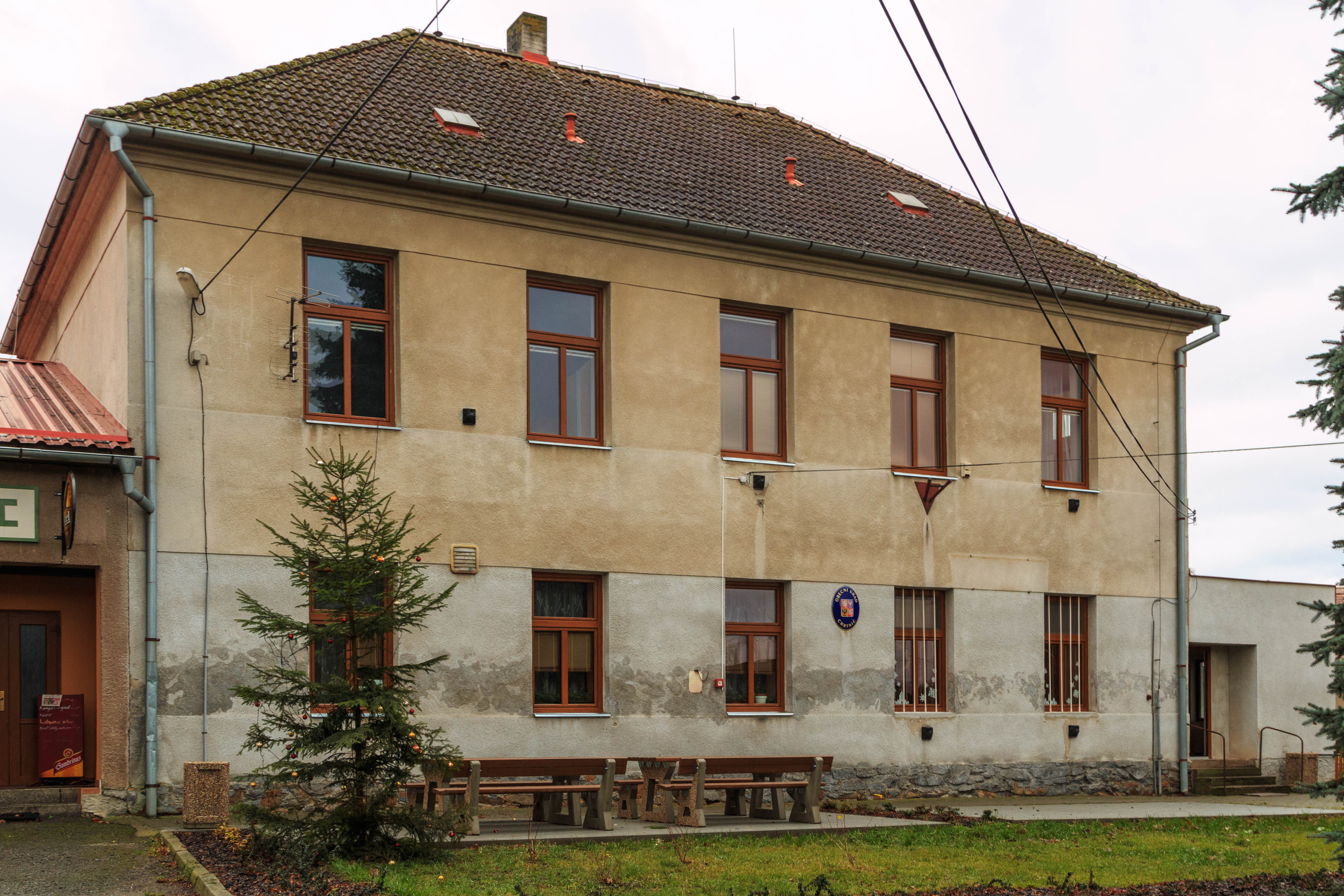 Chrtníč obecní úřad